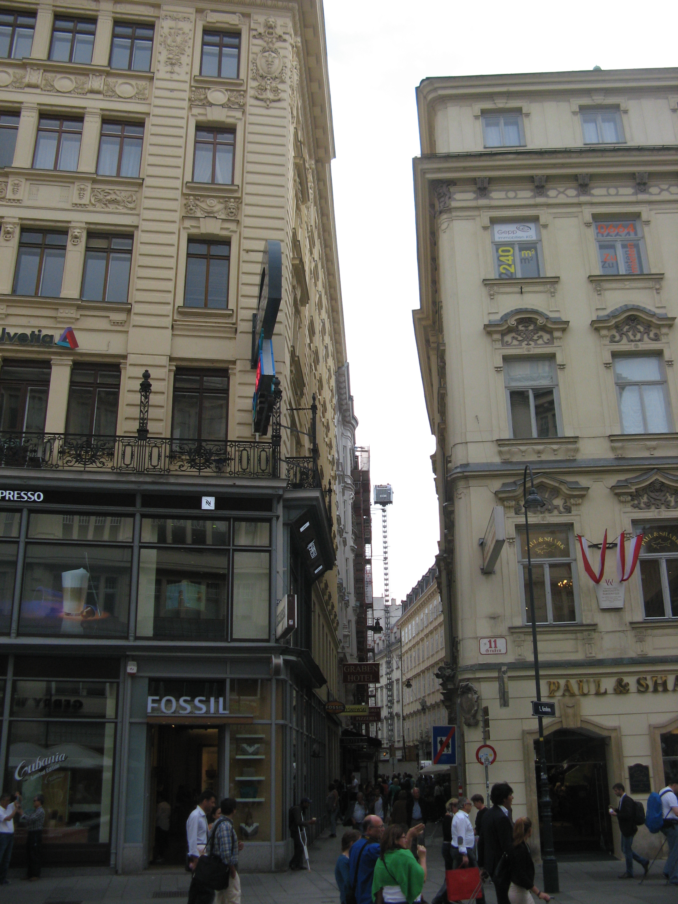 Dorotheergasse vom Graben aus gesehen, Wien-Innere Stadt